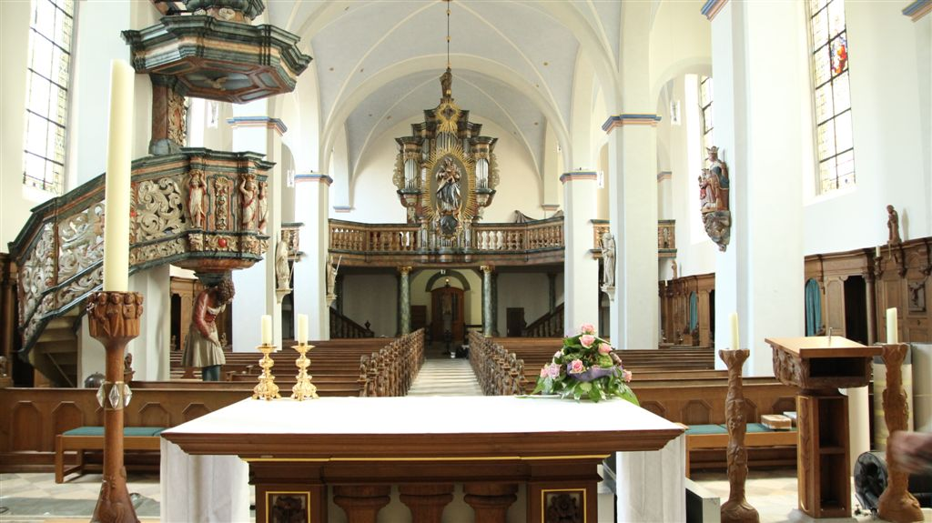 Kirche St. Pankratius Körbecke Bilck auf Orgel